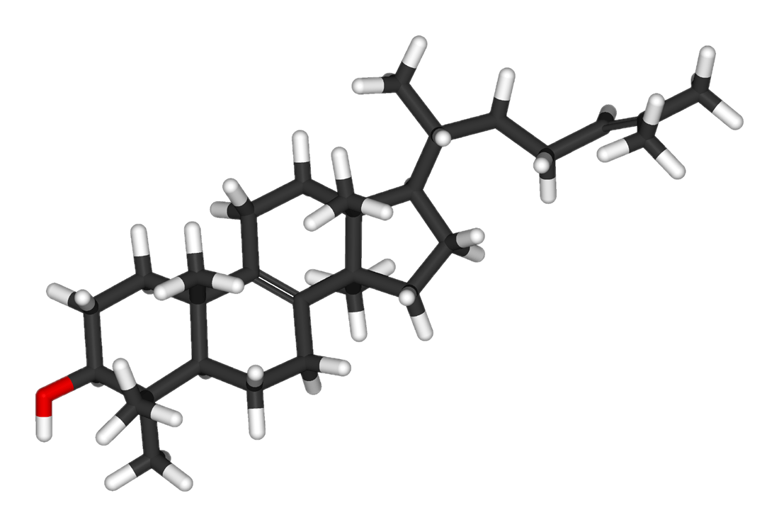 Lanosterol-3D-sticks